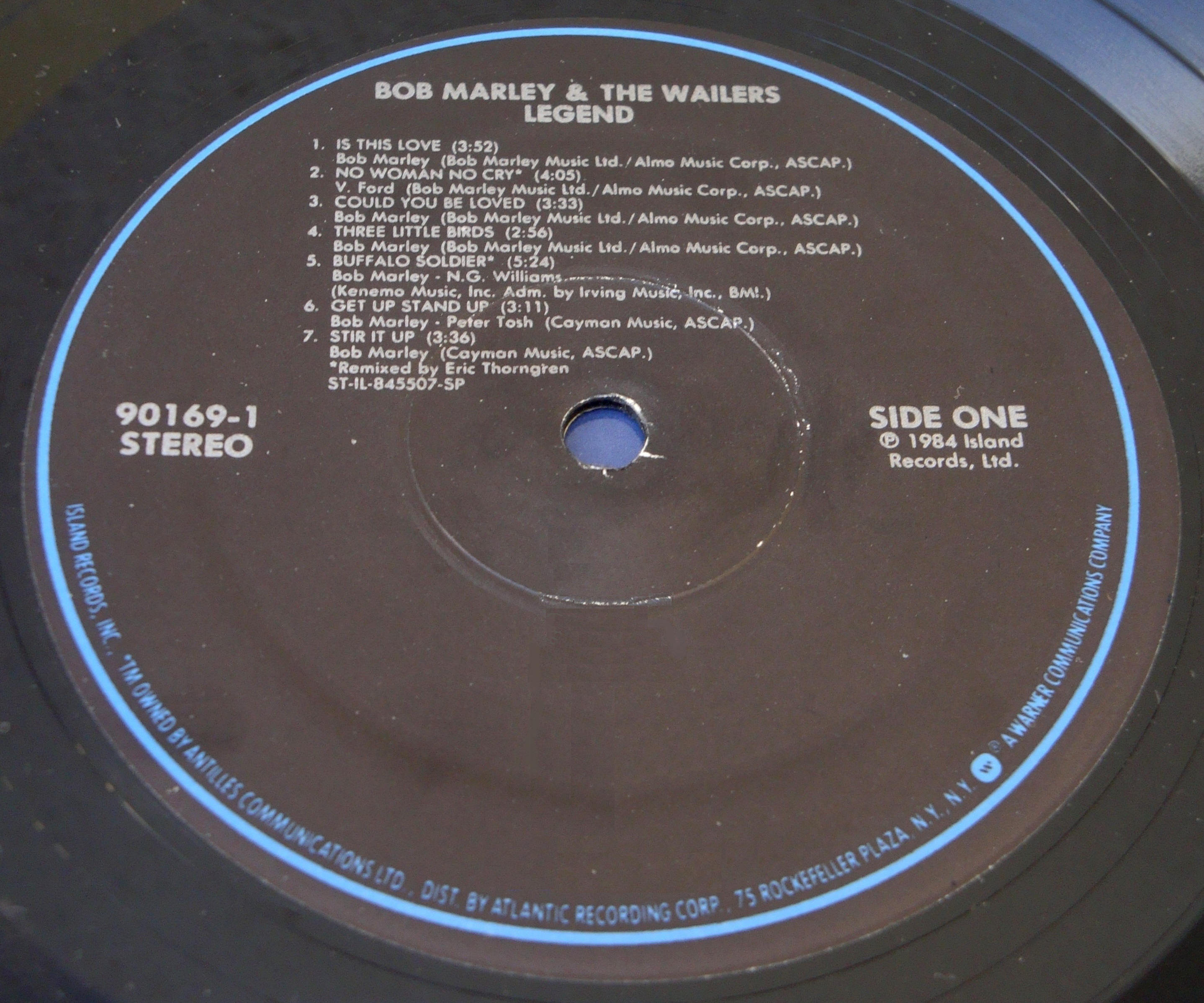 Fotografía tomada por mi del álbum "Legend" de Bob Marley, editado en 1984 por Island Records en formato vinilo.